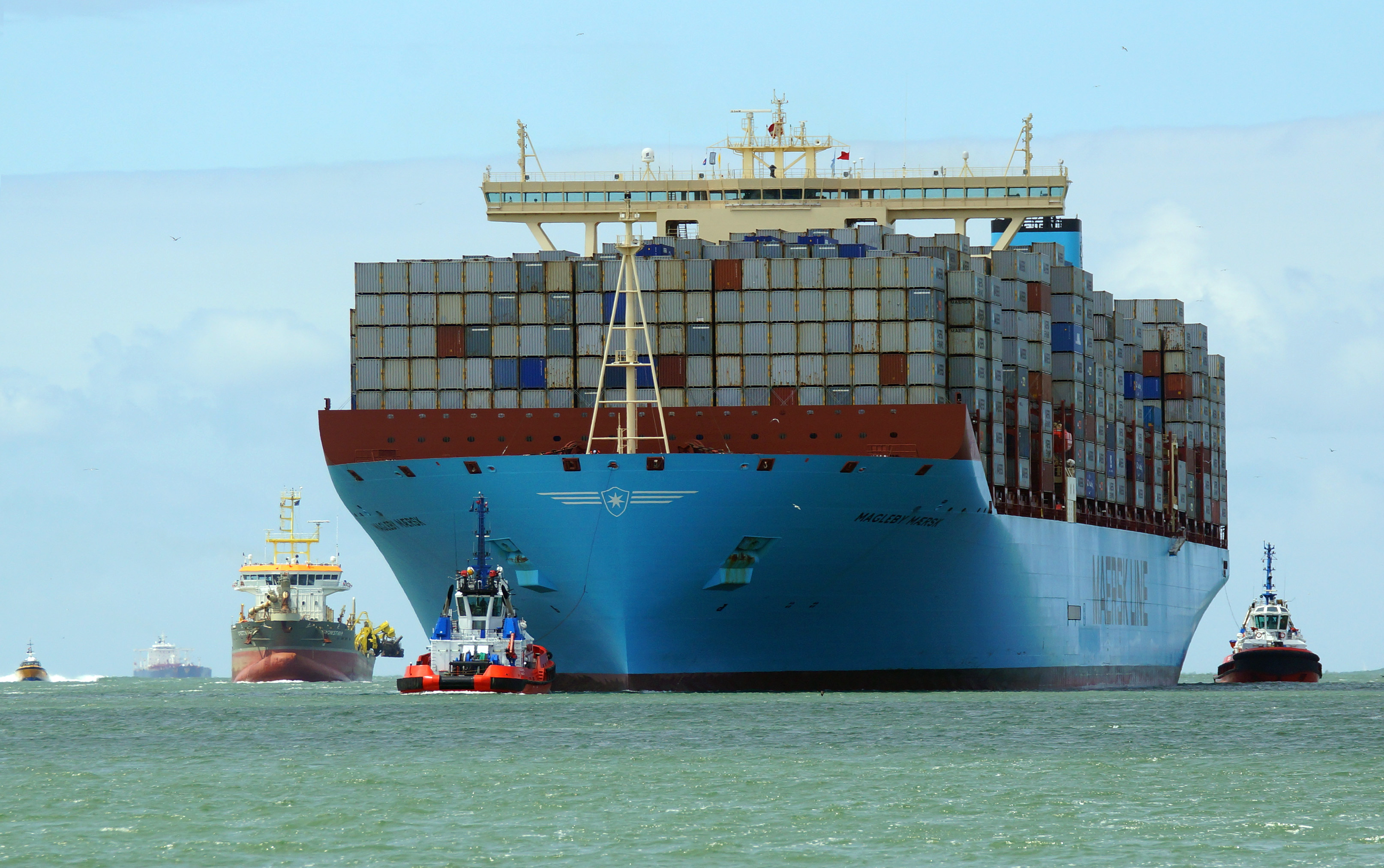 Magleby Maersk am Maasmond.